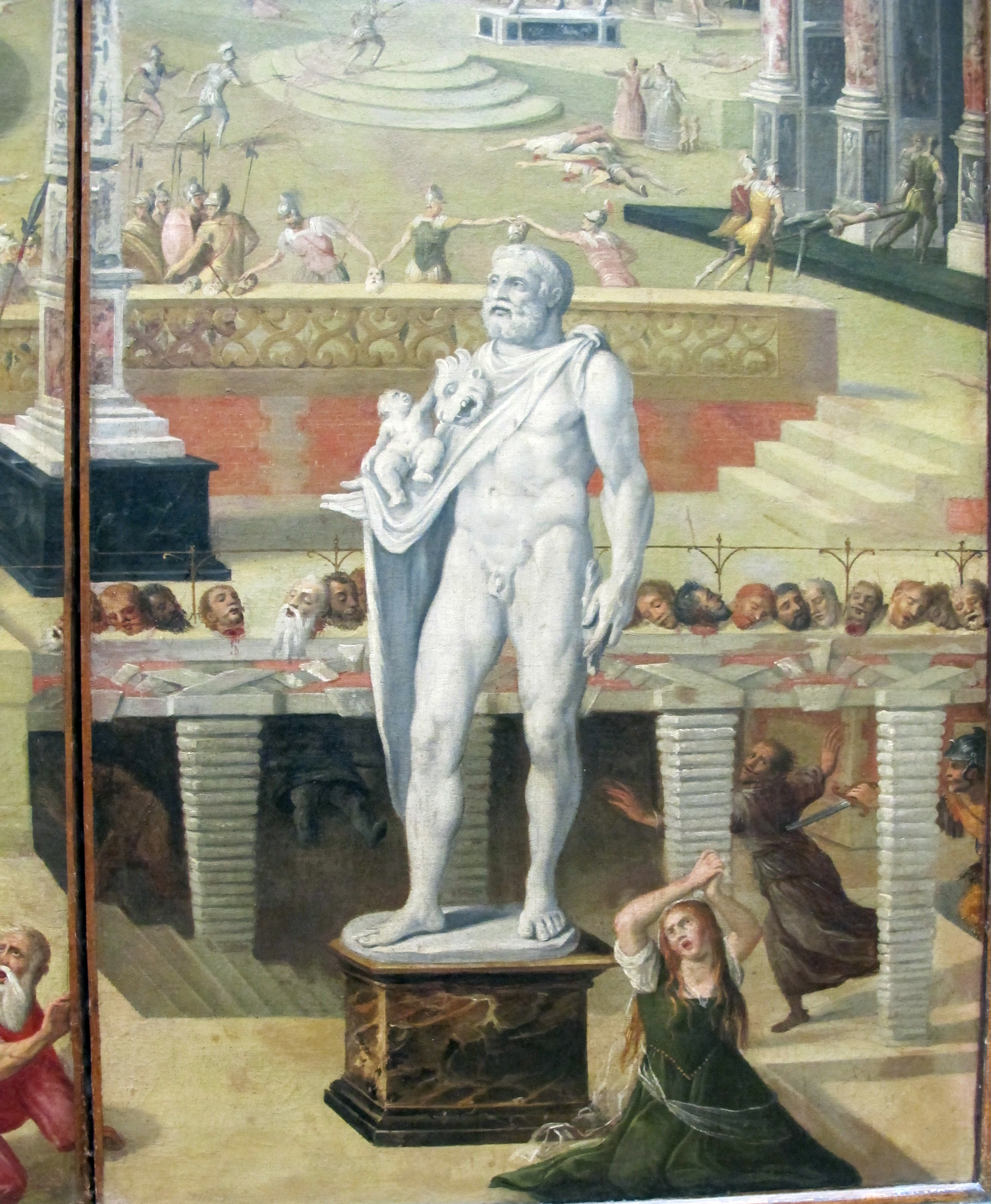 Pittura francese del XVI secolo, Louvre, Parigi